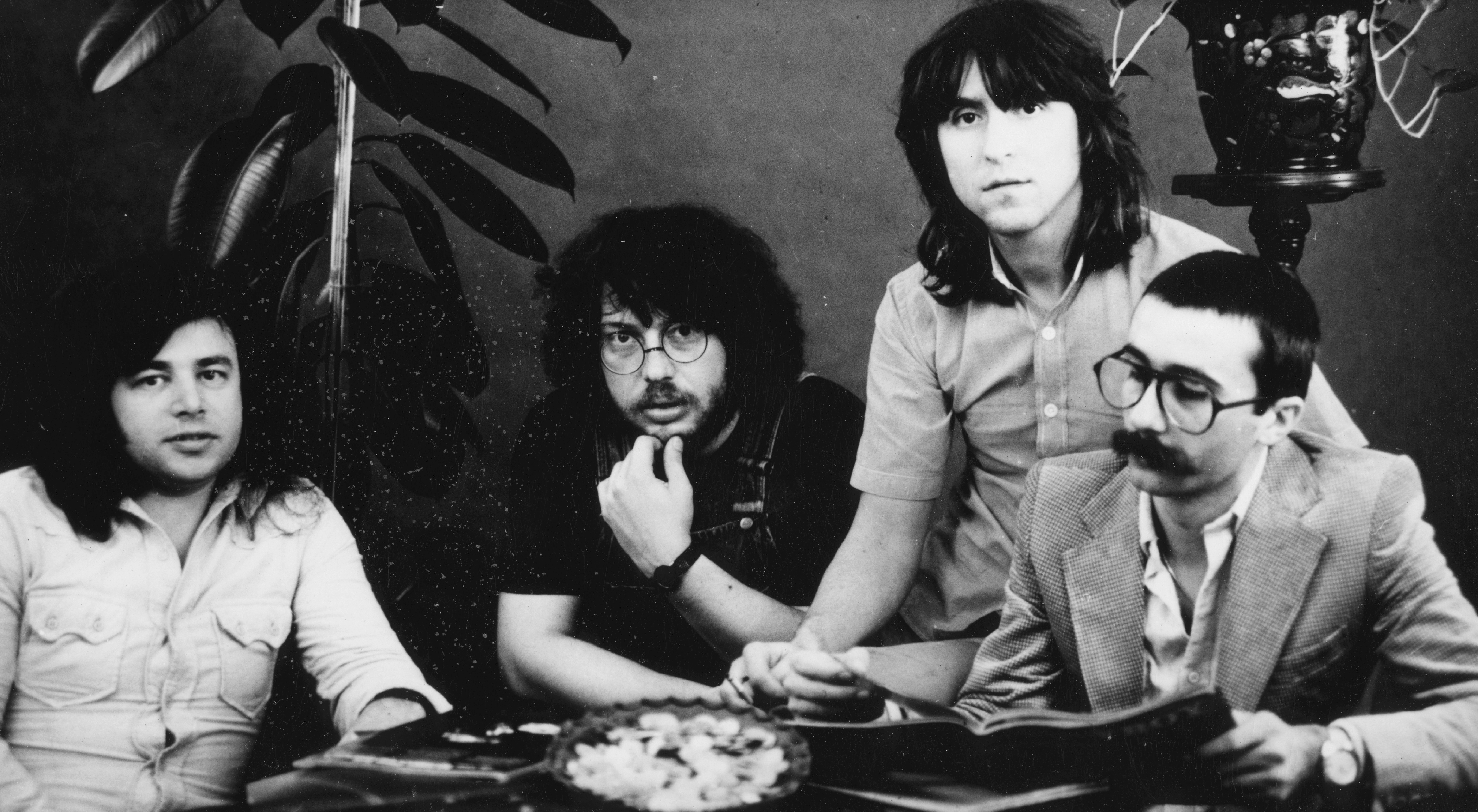 A Locomotiv GT a magyar rockzene egyik legnagyobb hatású együttese, Somló Tamás, Presser Gábor, Karácsony János, Solti János.